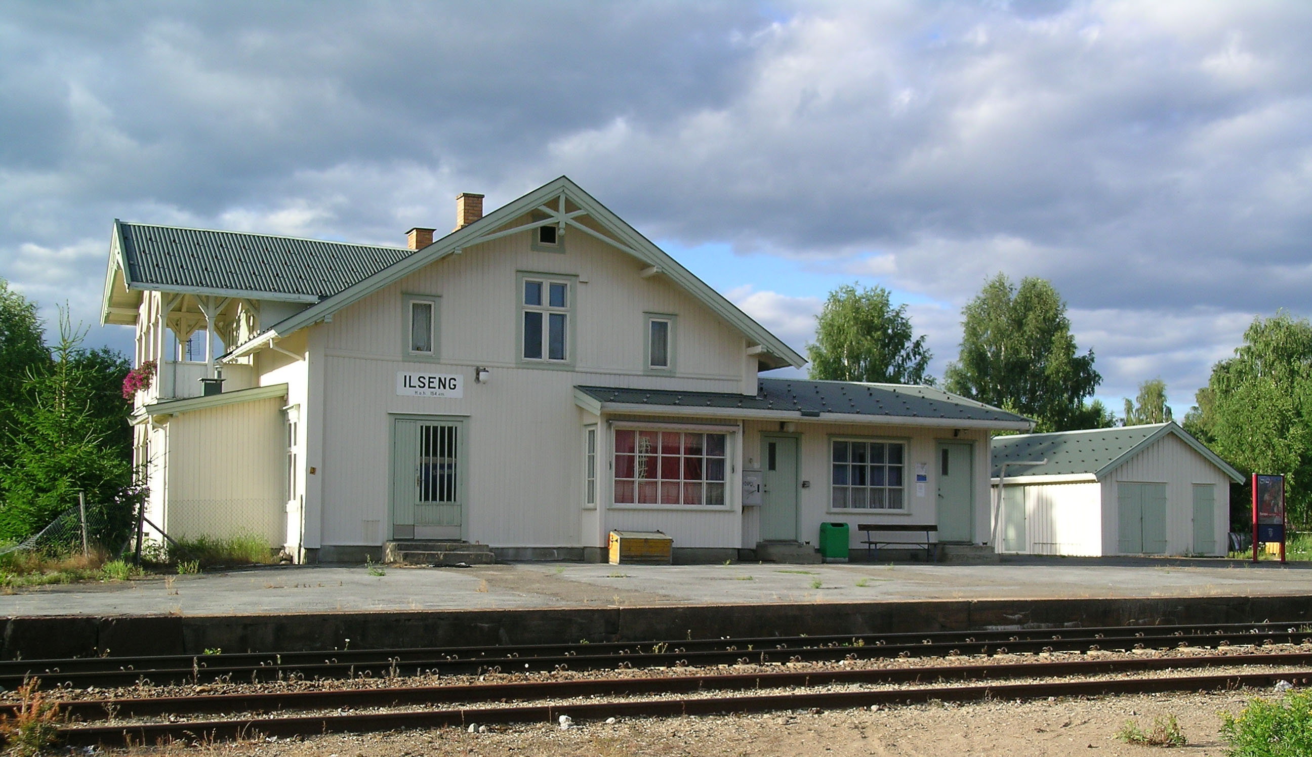 Ilseng station, Stange, Norway